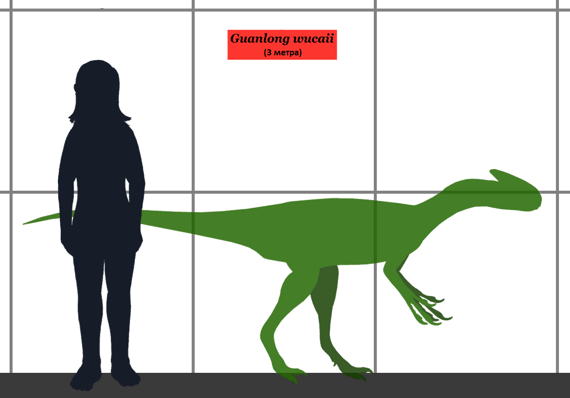 Сравнение размеров динозавра-тираннозавроида Guanlong wucaii (3 метра) и человека.